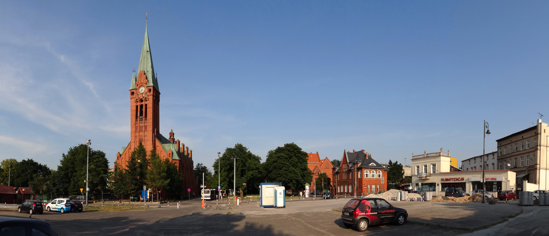 Kościół św. Andrzeja Boboli (Jezuicki) w Bydgoszczy, zbud. 1903 r., do 1945 r. fara ewangelicka